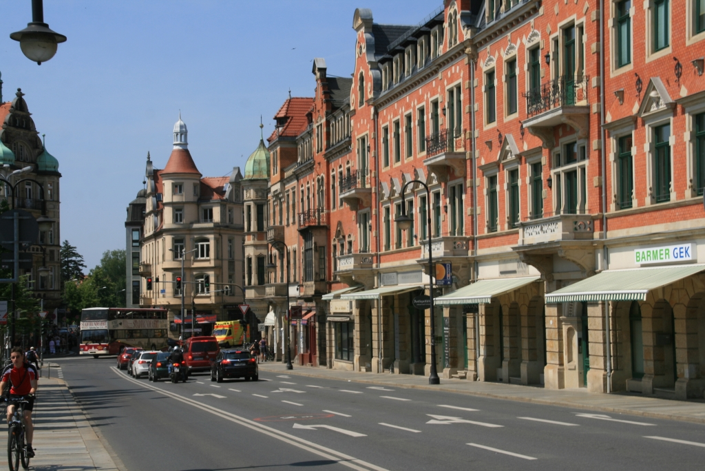 Die Straße zwischen dem Blauen Wunder und dem Schillerplatz in Dresden